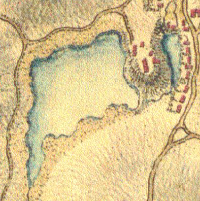 maparyb